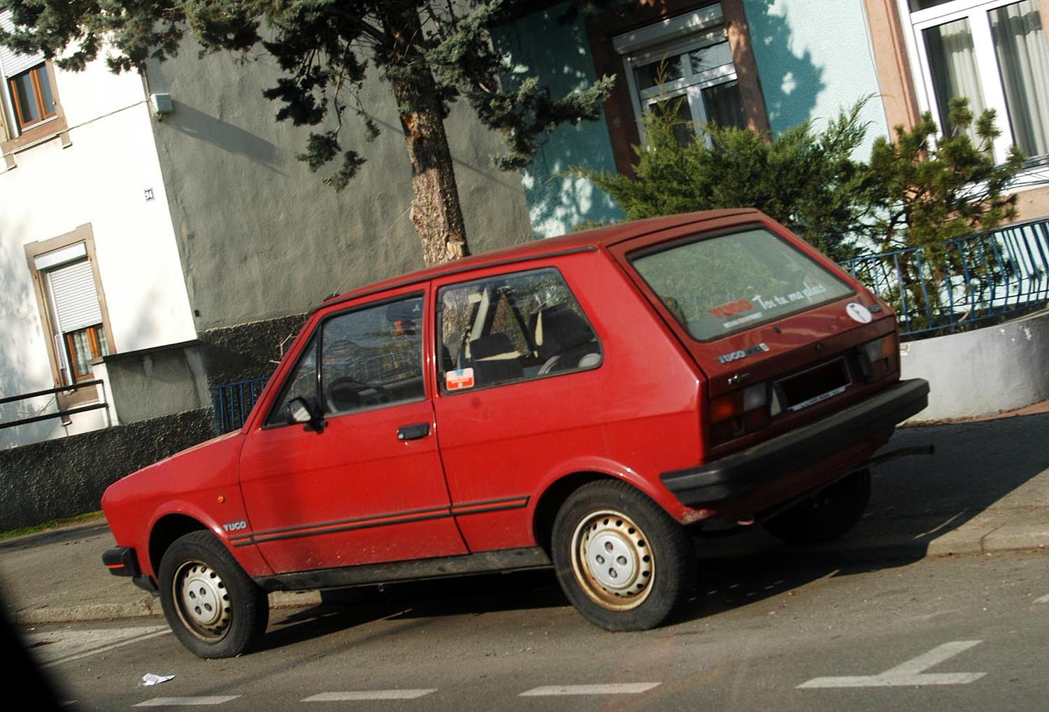 Une Yugo 45A en Alsace en 2005 (photo mise à ma disposition par Roulax).